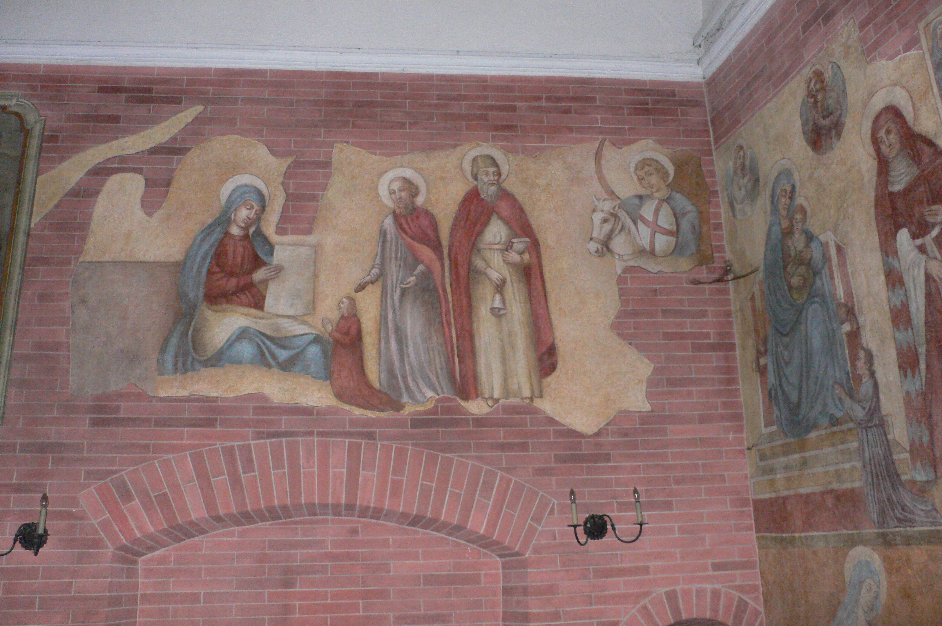 Maria, Bartholomäus, Antonius der Einsiedler, Ritter Georg zu Pferd